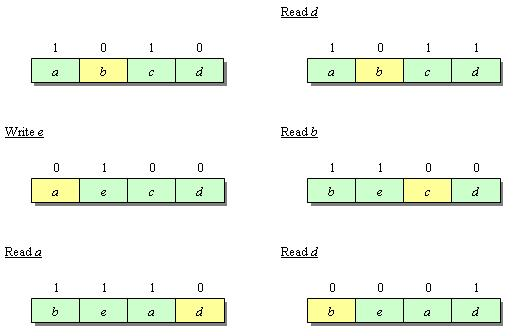 Séquence de test de l'algorithme PLRUm